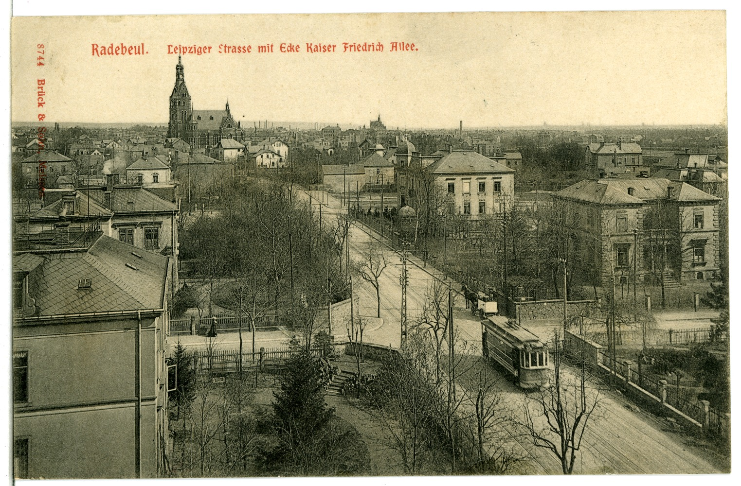 Radebeul; Leipziger Straße mit Ecke Kaiser Friedrich Allee This postcard is from publisher Brück & Sohn in Meißen ( postcard has a unique number 08744 and is available in a higher resolution at the publisher. This images was uploaded in a cooperation project between Wikipedians and the publisher.